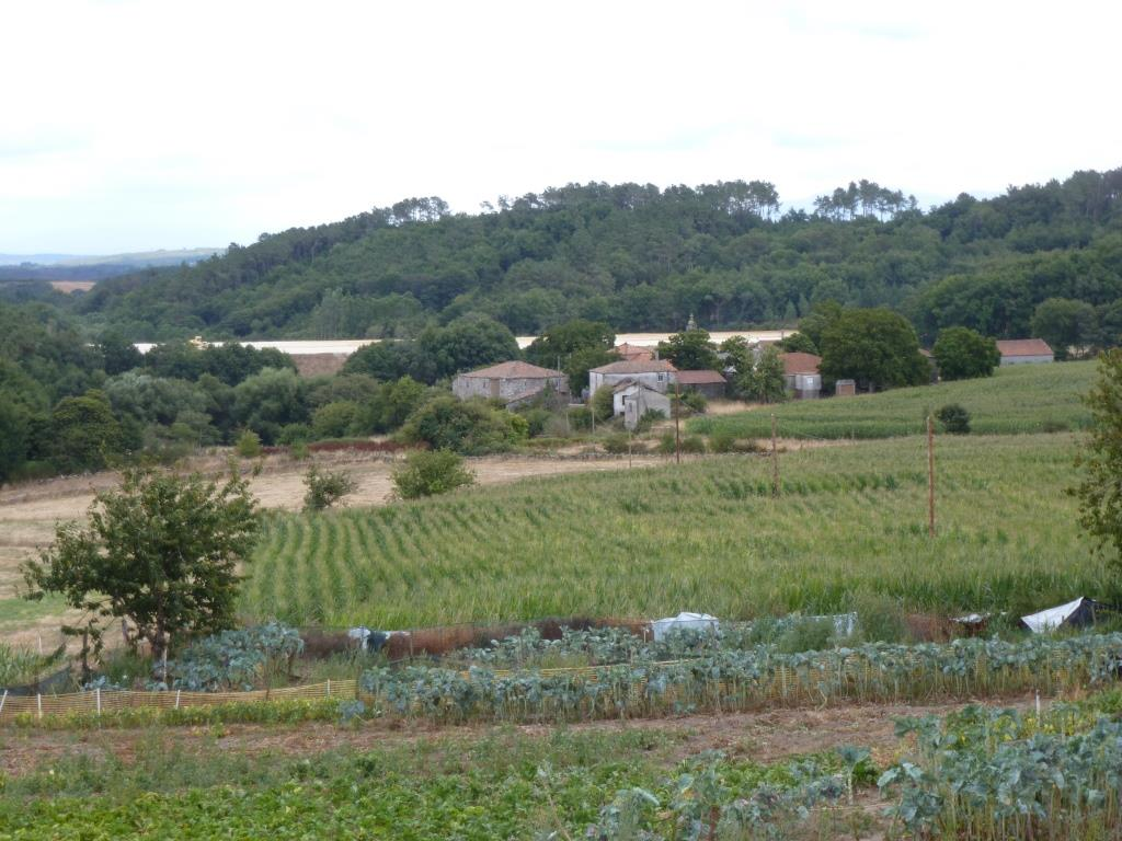 Lugar de Lobelle de Abaixo, parroquia de Lobelle, concello de Carballedo, Lugo